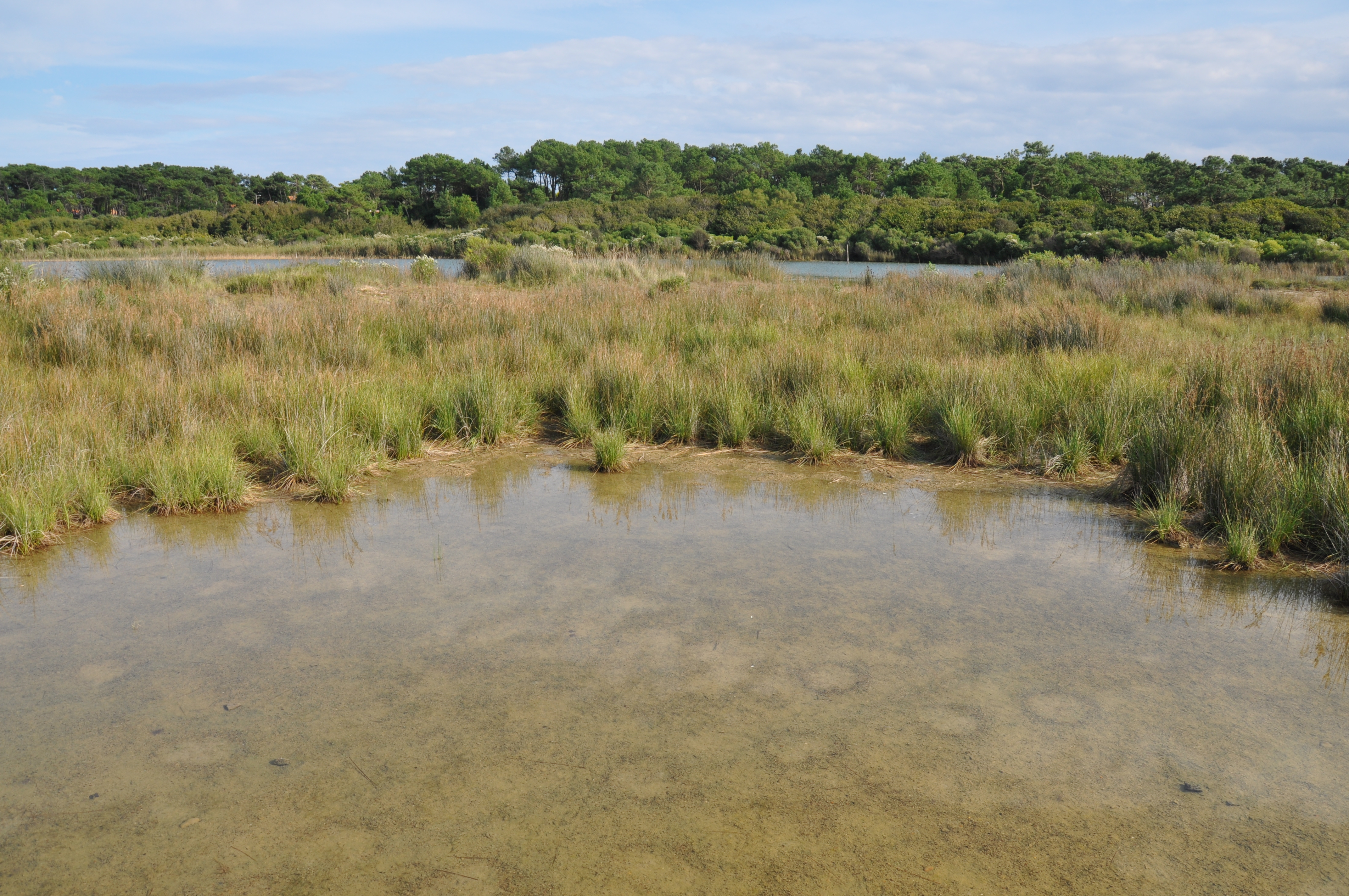 Pinède chiberta Anglet